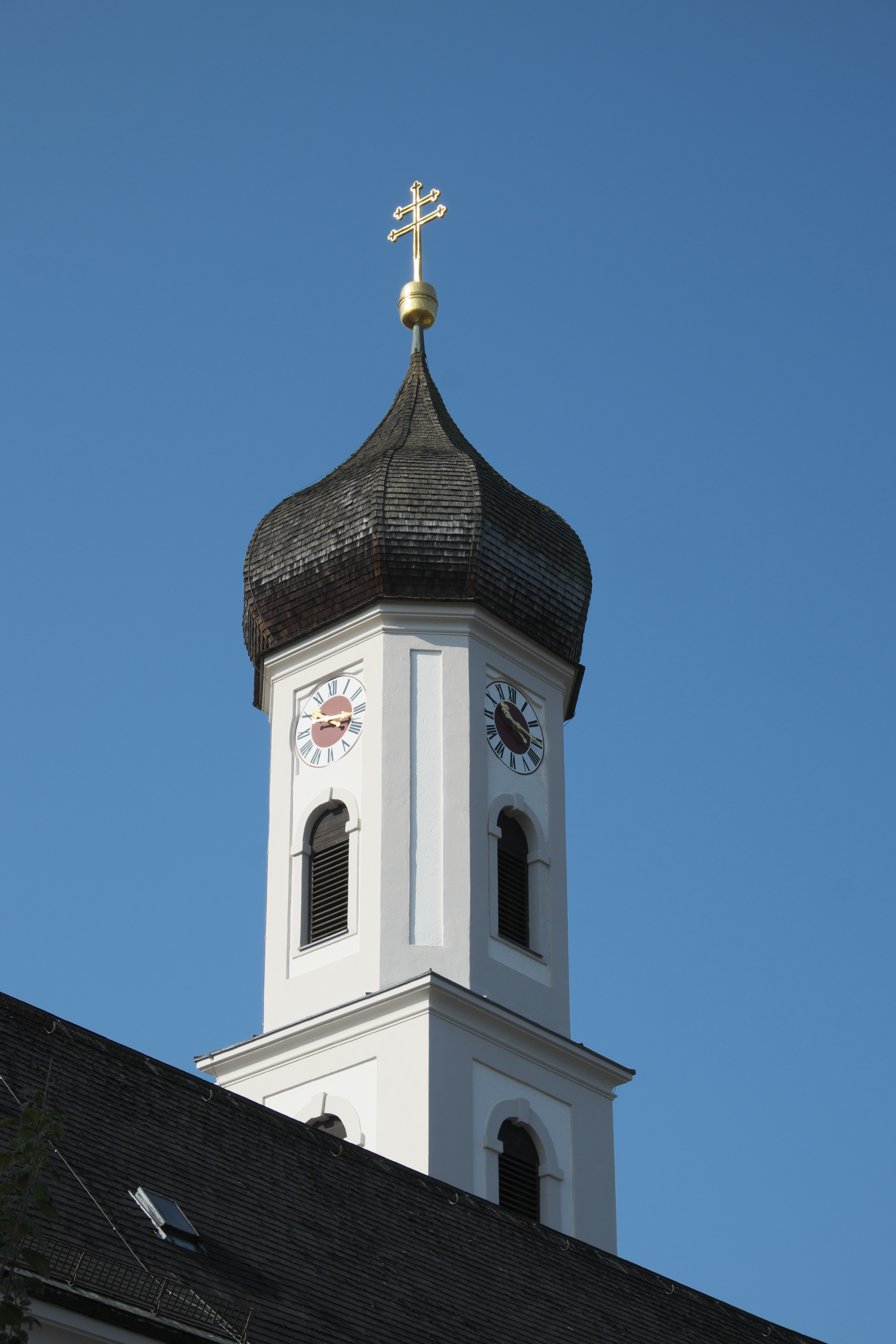 Katholische Pfarrkirche St. Valentin in Unterföhring im Landkreis München (Bayern/Deutschland)